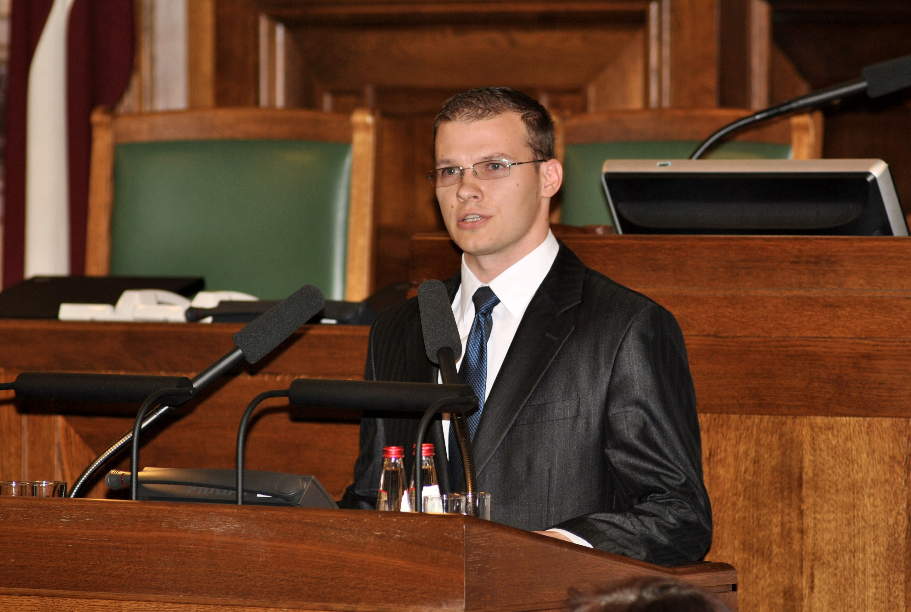 2010.gada 2.novembris. 10.Saeimas pirmajā sēdē deputāta svinīgo solījumu dod Raivis Dzintars. Foto: Katrīna Ķepule, Saeimas Kanceleja